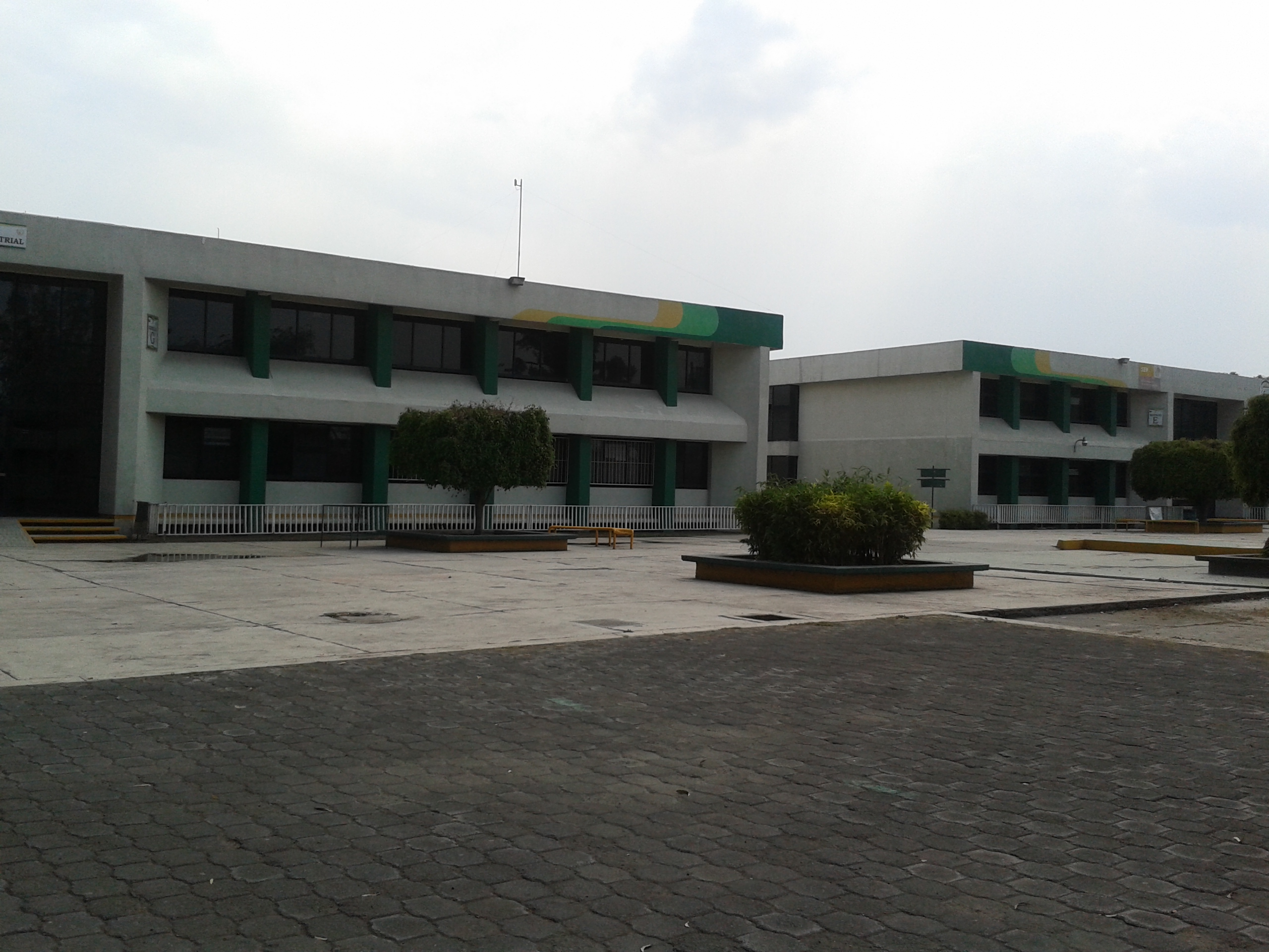 Edificio de Ingenier?a Industrial